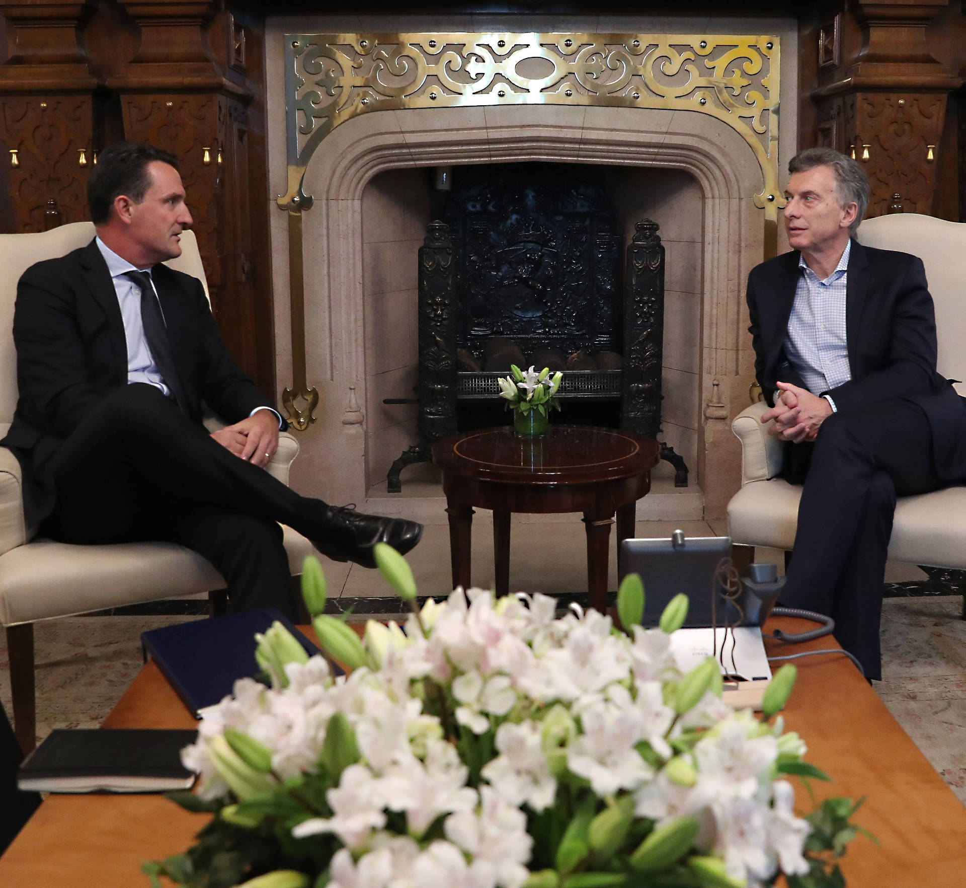 El presidente Mauricio Macri recibió a los directivos de la empresa estadounidense AMGEN, líder en el desarrollo de medicamentos innovadores para el tratamiento de enfermedades graves. La audiencia se realizó en el despacho presidencial de la Casa Rosada, en el marco de la inauguración de la sede y laboratorio de control de calidad de alta tecnología de la compañía en el partido bonaerense de Vicente López. La empresa, que tiene presencia en el país desde 2010, anunció una inversión inicial de 100 millones de dólares. Prevé realizar una inversión adicional de 10,5 millones de dólares e incorporar 150 técnicos calificados a los 50 que trabajan en la actualidad para la investigación clínica. Concurrieron a la audiencia el manager y responsable de operaciones comerciales en la región, Ian Thompson; el gerente general de la multinacional en la Argentina, Cristian Videla, y el director de Asuntos Públicos, Nicolás Nobile. Por parte del Gobierno asistieron la ministra de Desarrollo Social, Carolina Stanley; el secretario de Gobierno de Ciencia y Tecnología, Lino Barañao, el director general de Inversiones de la Agencia de Inversiones y Comercio Internacional, Francisco Uranga, y el asesor de la Jefatura de Gabinete de Ministros Matías García Oliver. Fundada en 1980 y con presencia en más de 100 países, la empresa biotecnológica se especializa en el desarrollo de medicamentos para seis áreas terapéuticas: cardiovascular, oncología, salud ósea, neurociencia, nefrología e inflamación.